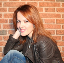 Foto de Vanessa Montfort